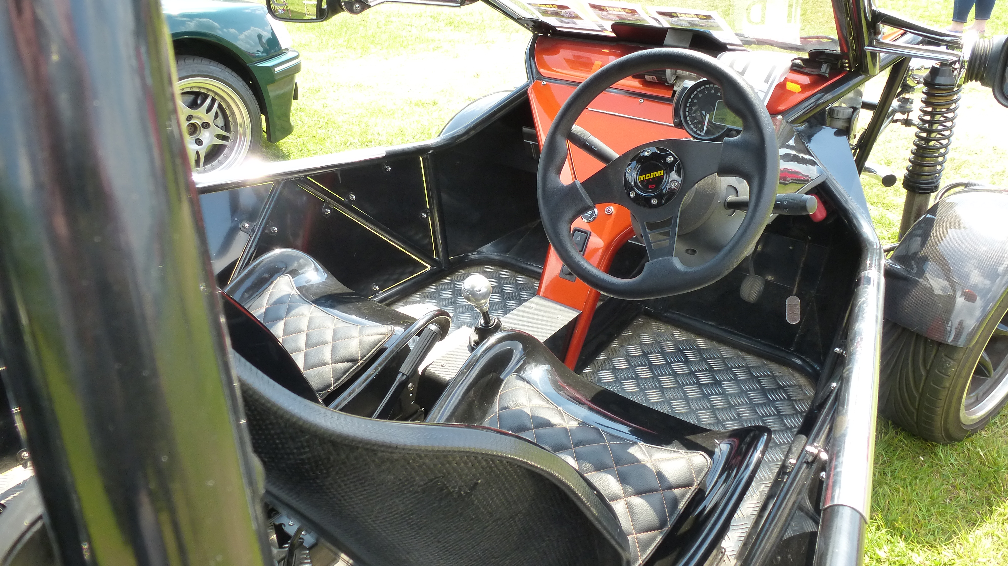 Animoto Sports Buggies 2014 Interieur